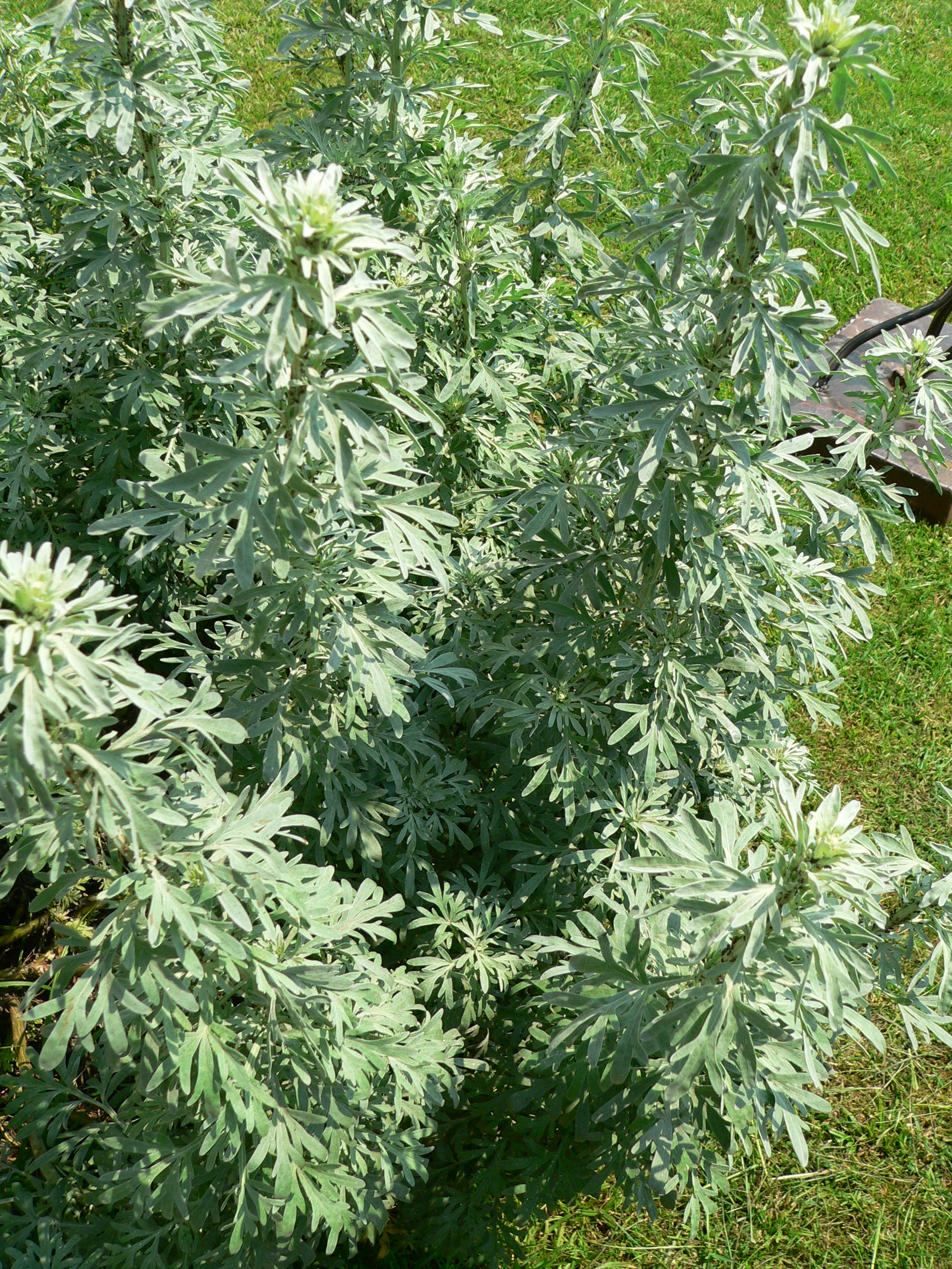 Artemisia absinthium, jardin du musée de l'absinthe, Auvers-sur-Oise, France